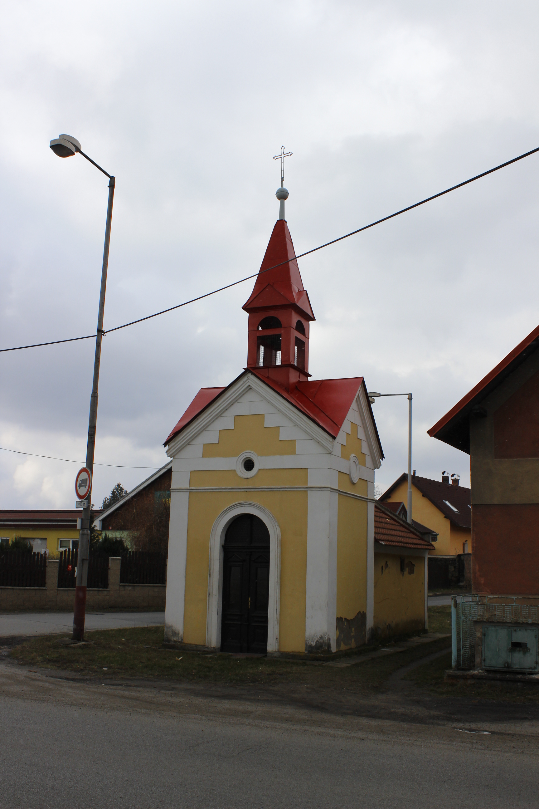 Kaple v mladoboleslavském Bezděčíně (pohled od severovýchodu).